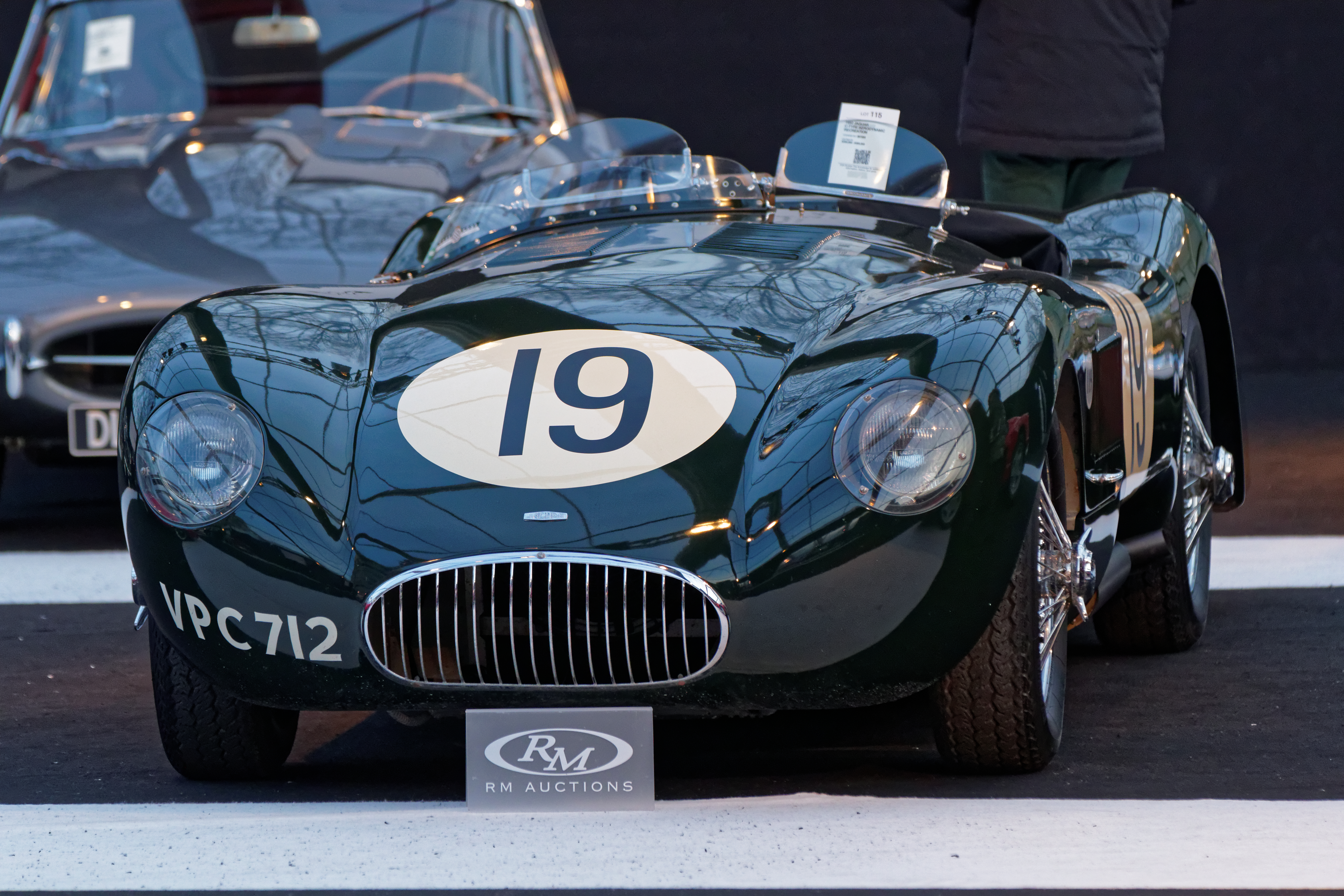 La vente aux enchères RM auctions aux pied des Invalides à Paris le 4 février 2015.